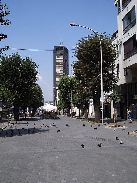 Аутор: Саша Костић "Београђанка" Licensing